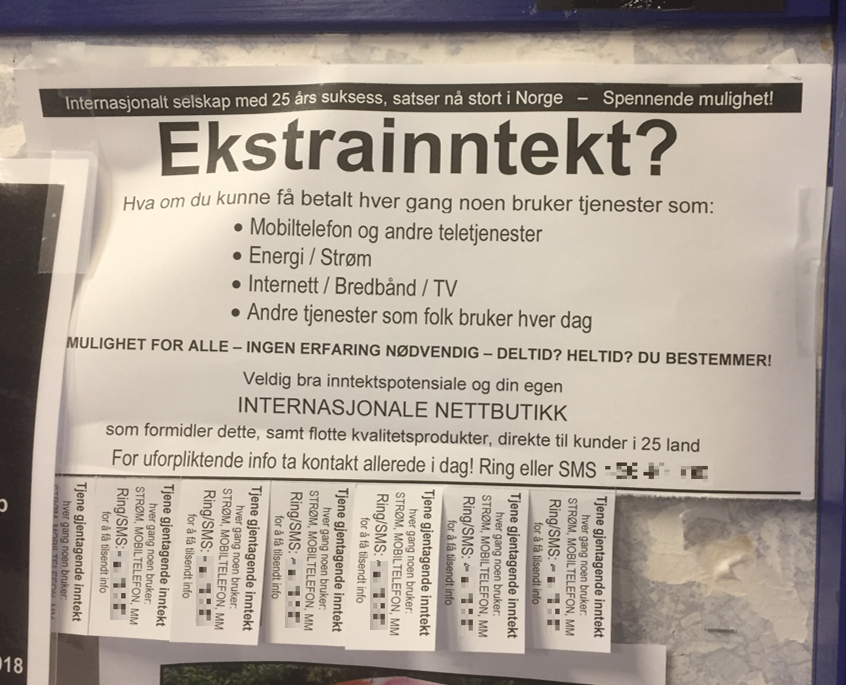 Avfotografert reklame for nettverksselskap